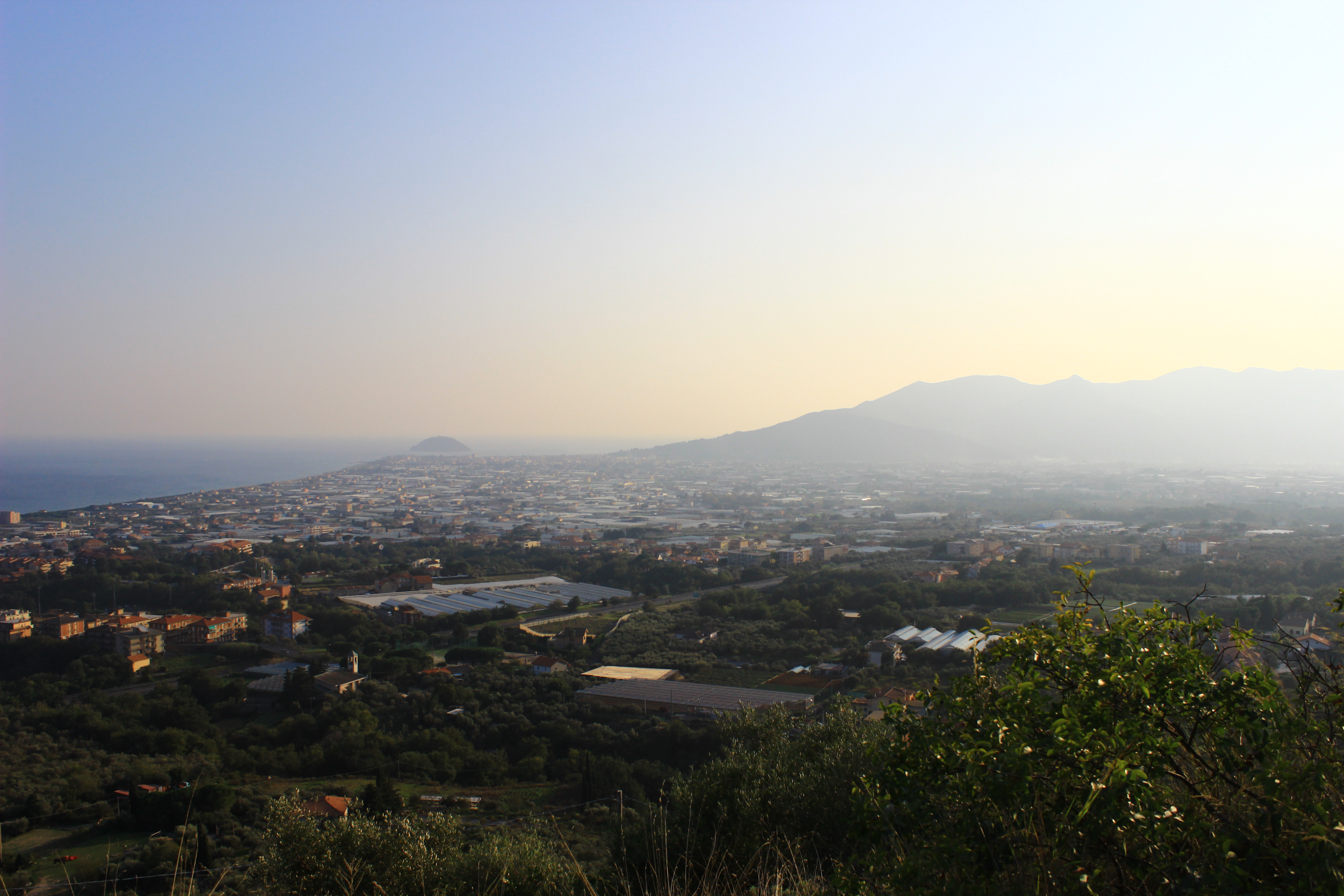 La piana di Albenga vista al tramonto, sulle colline sopra Cariale, con in lontananza l'Isola Gallinara